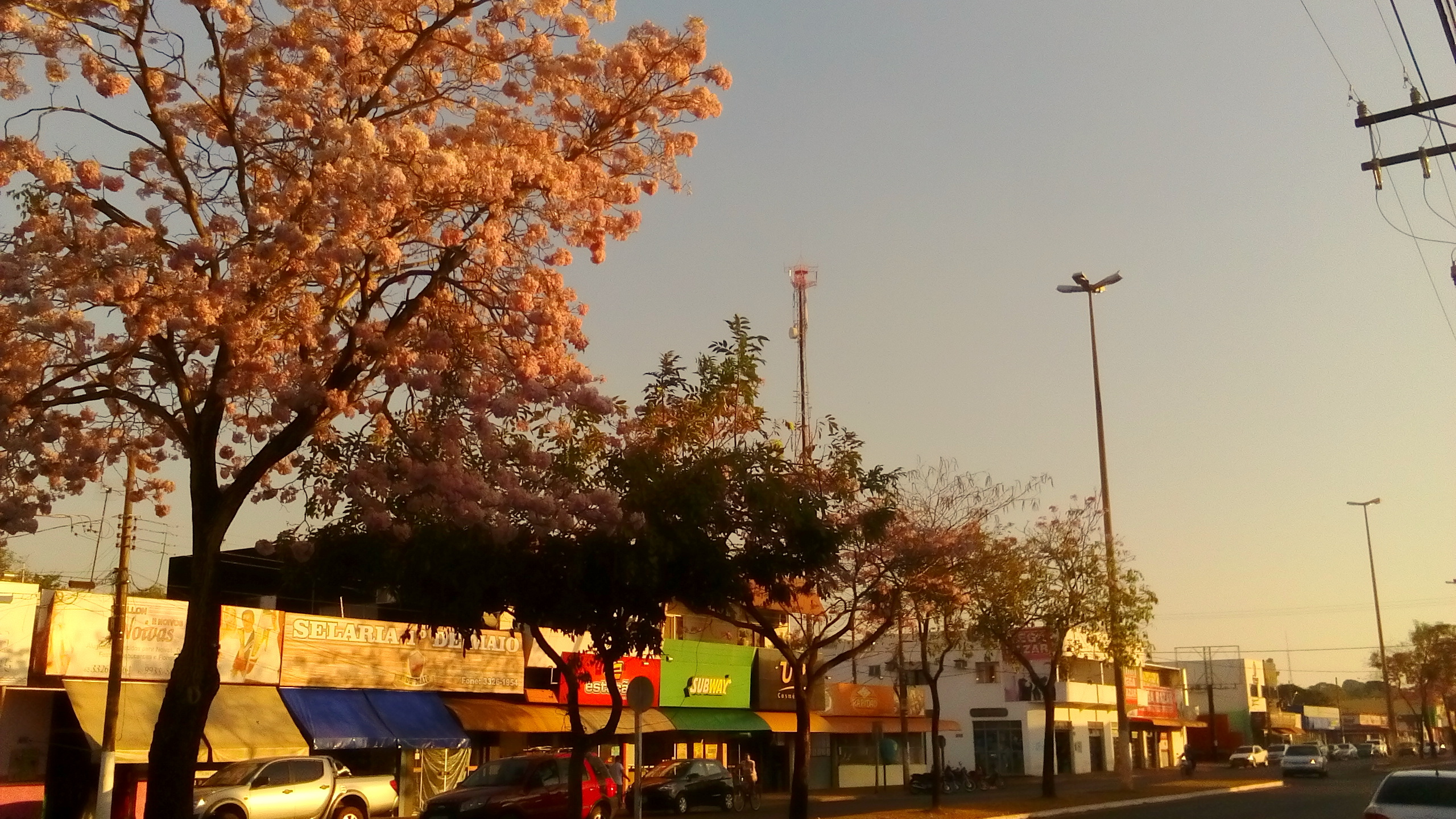 Florada de Ipês, na Avenida Brasil, em Tangará da Serra - MT.